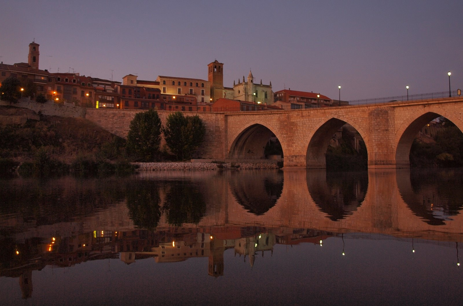 tordesillas al aterdecer en el estío desde la playa